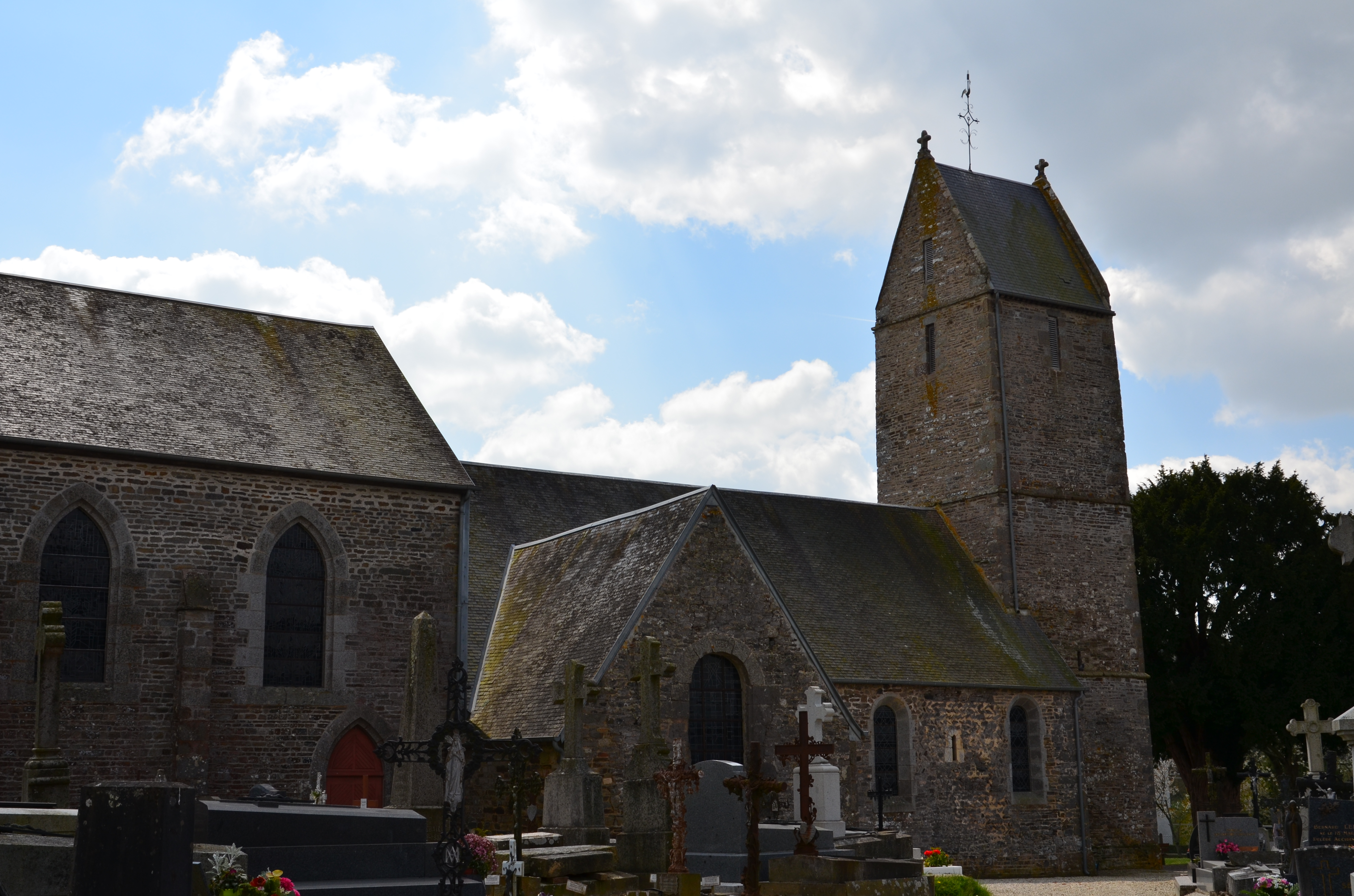 Église Saint-André de Viessoix. Le mur nord de la nef, à côté du clocher, est appareillé en arête-de-poisson